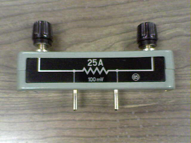 Shunt de 25 A - 100mV